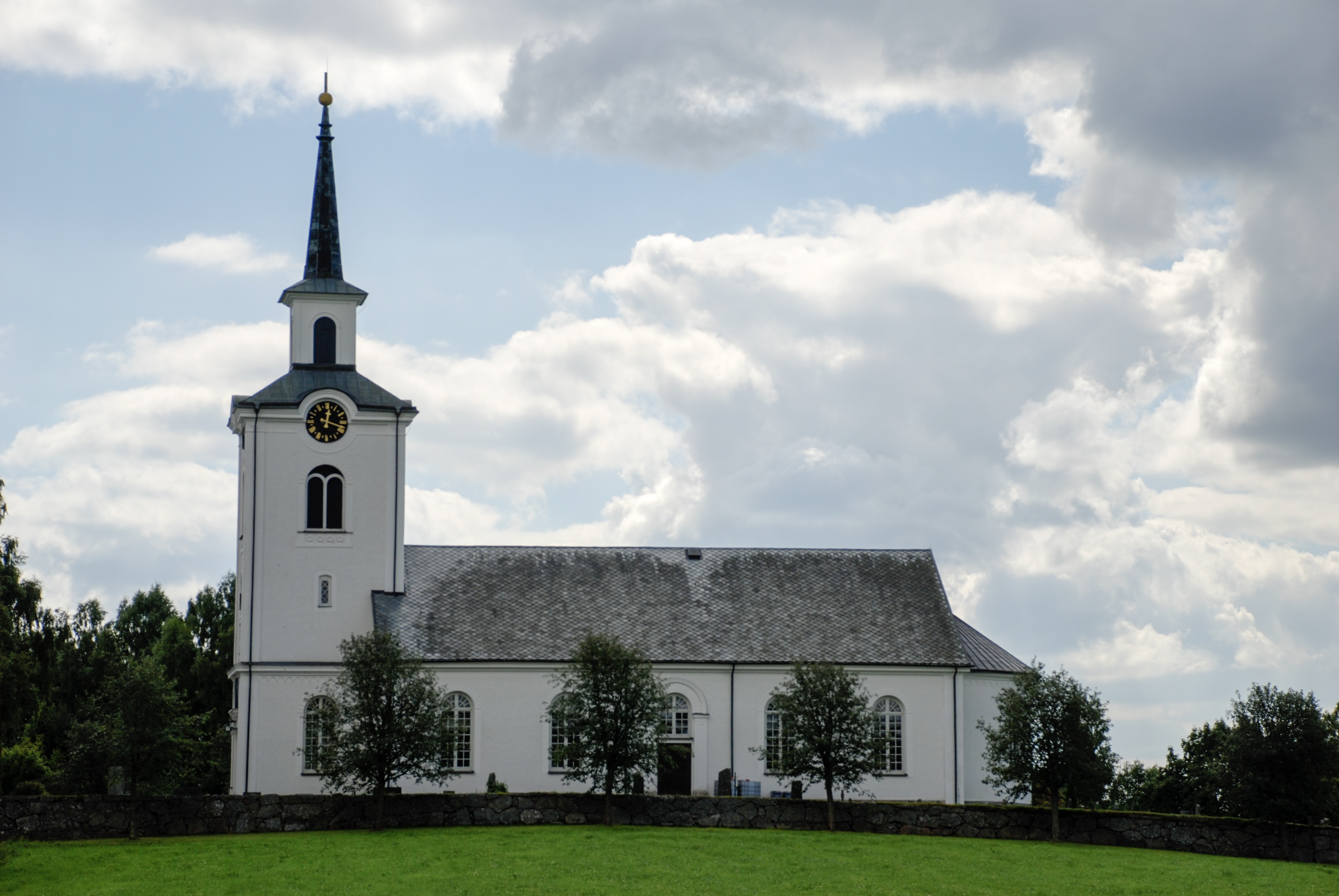 Sjösås nya kyrka